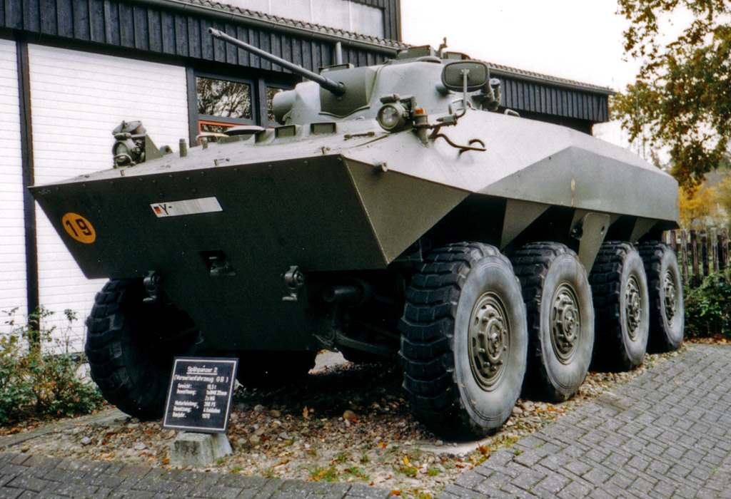 Spähpanzer Luchs (Prototyp/Vorserie), ausgestellt im Panzermuseum Munster